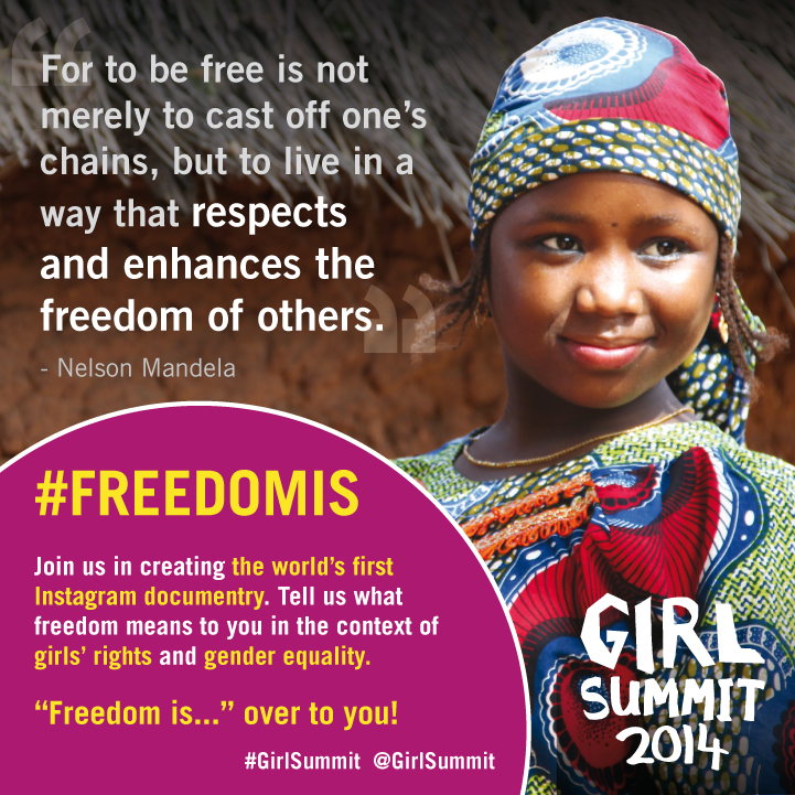 FreedomIs